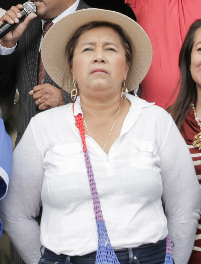 Guadalupe Llori en 2017